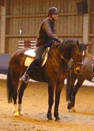 Freddy, ein Brandenburger Warmblutpferd im Schulbetrieb.